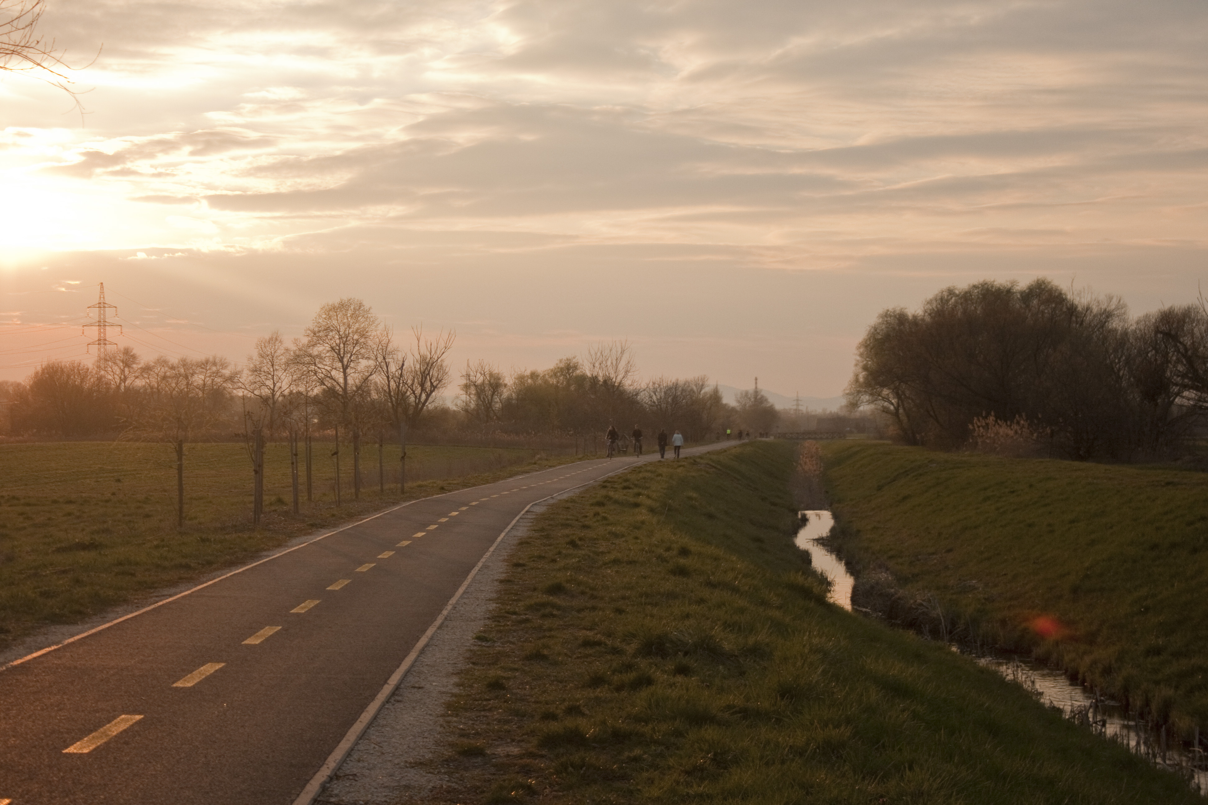 Szilas-patak Cinkotán